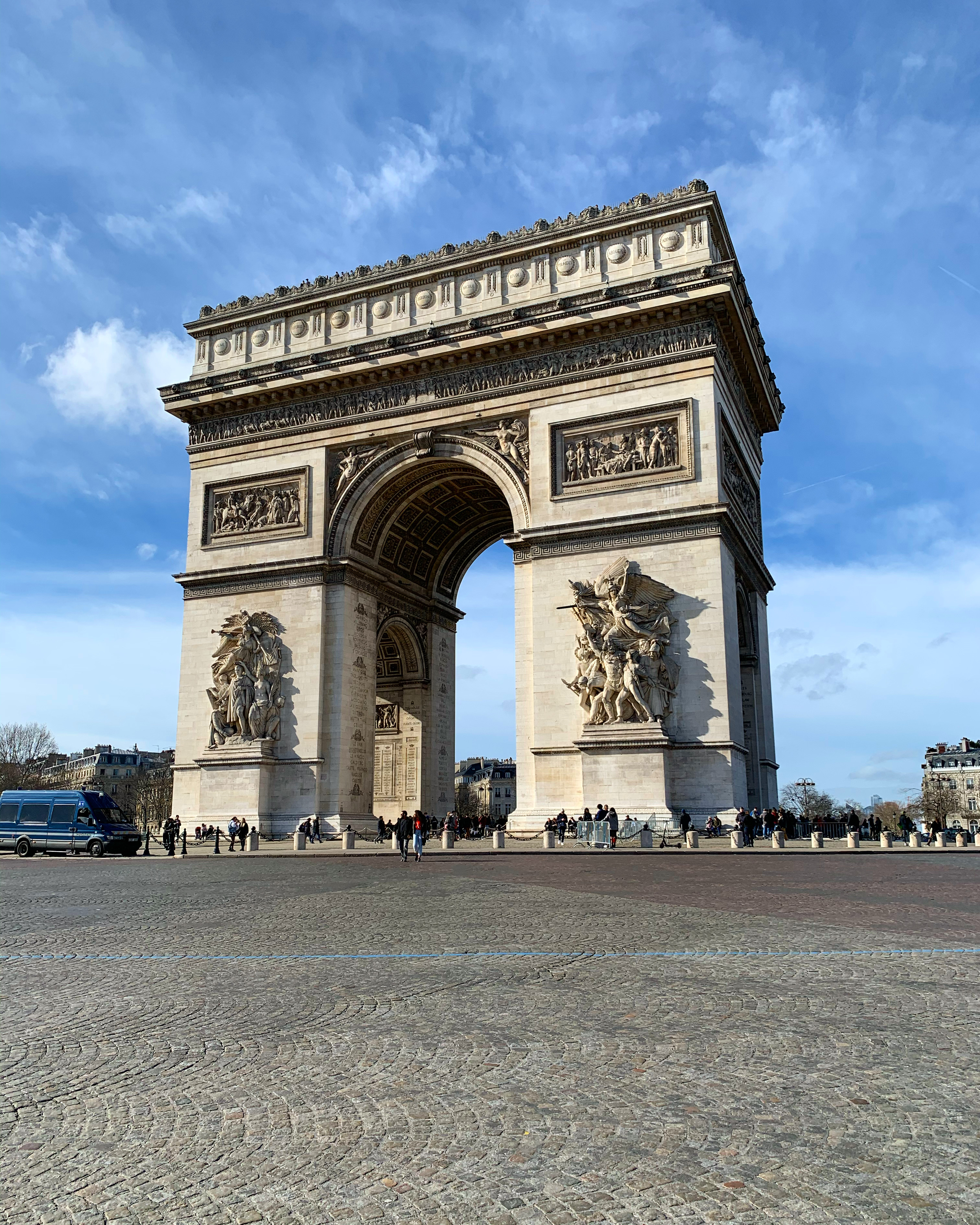 Vítězný oblouk při pohledu z Avenue des Champs-Élysées